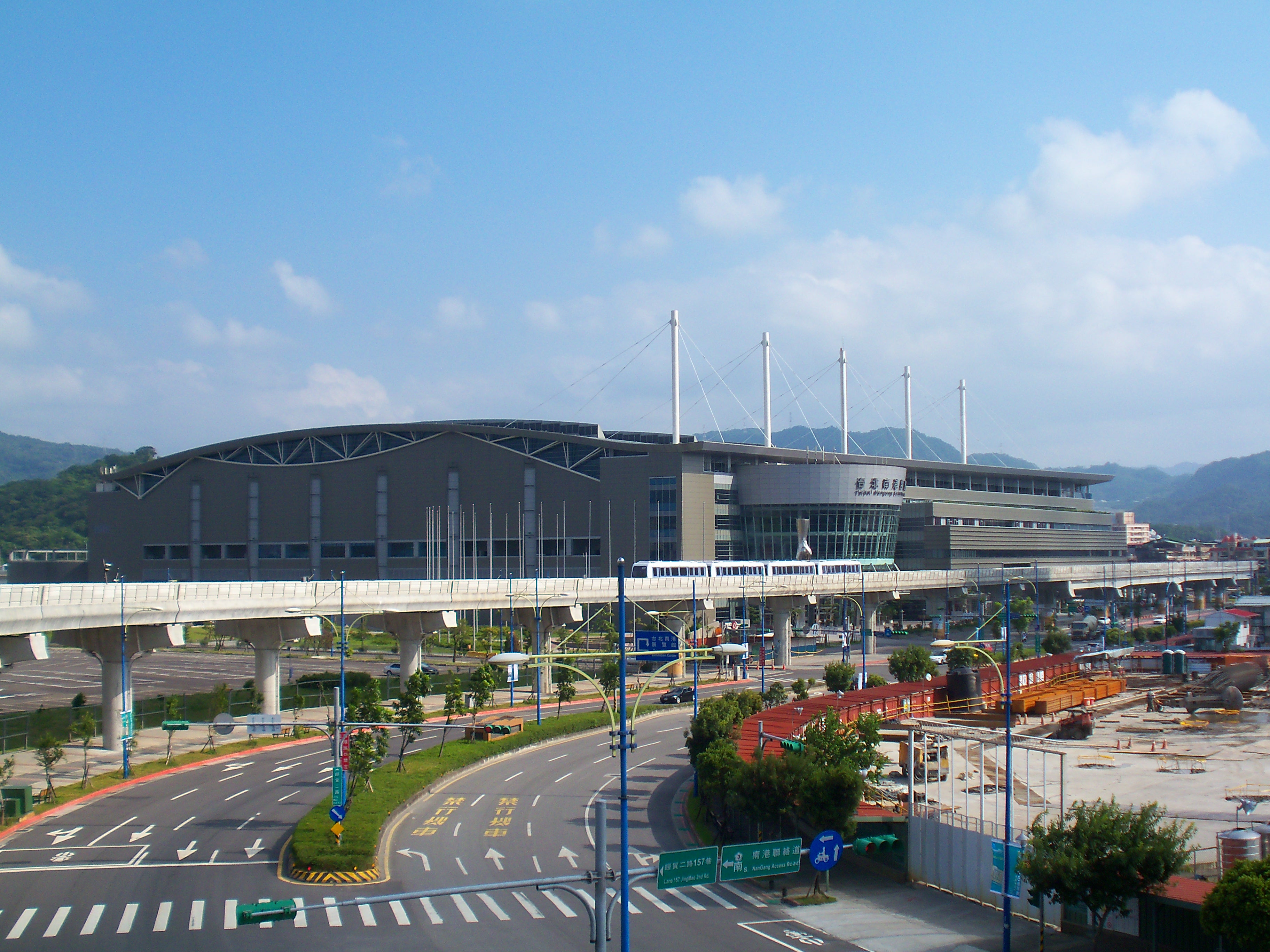 台北捷運南港軟体園区駅から望む台北世界貿易センター南港展覧館と捷運内湖線。